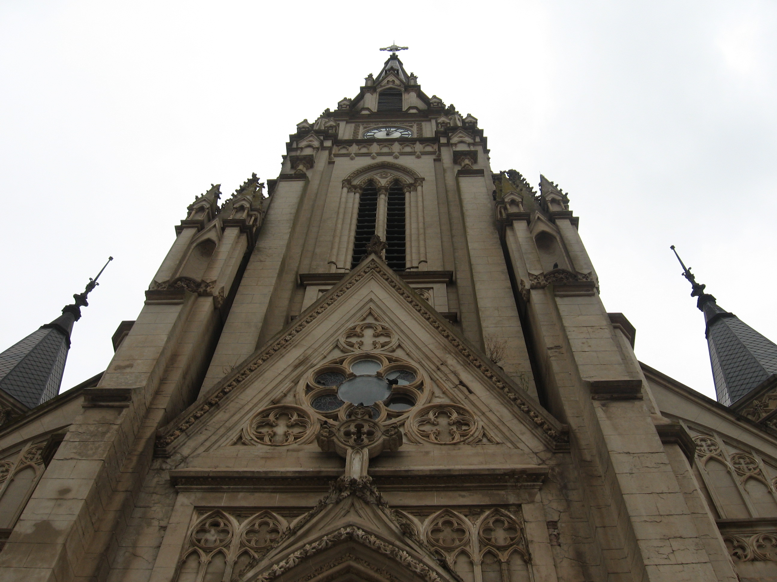 Iglesia Catedral de la ciudad bonaerense de Mercedes. Foto tomada desde la ase, enfocada hacia arriba